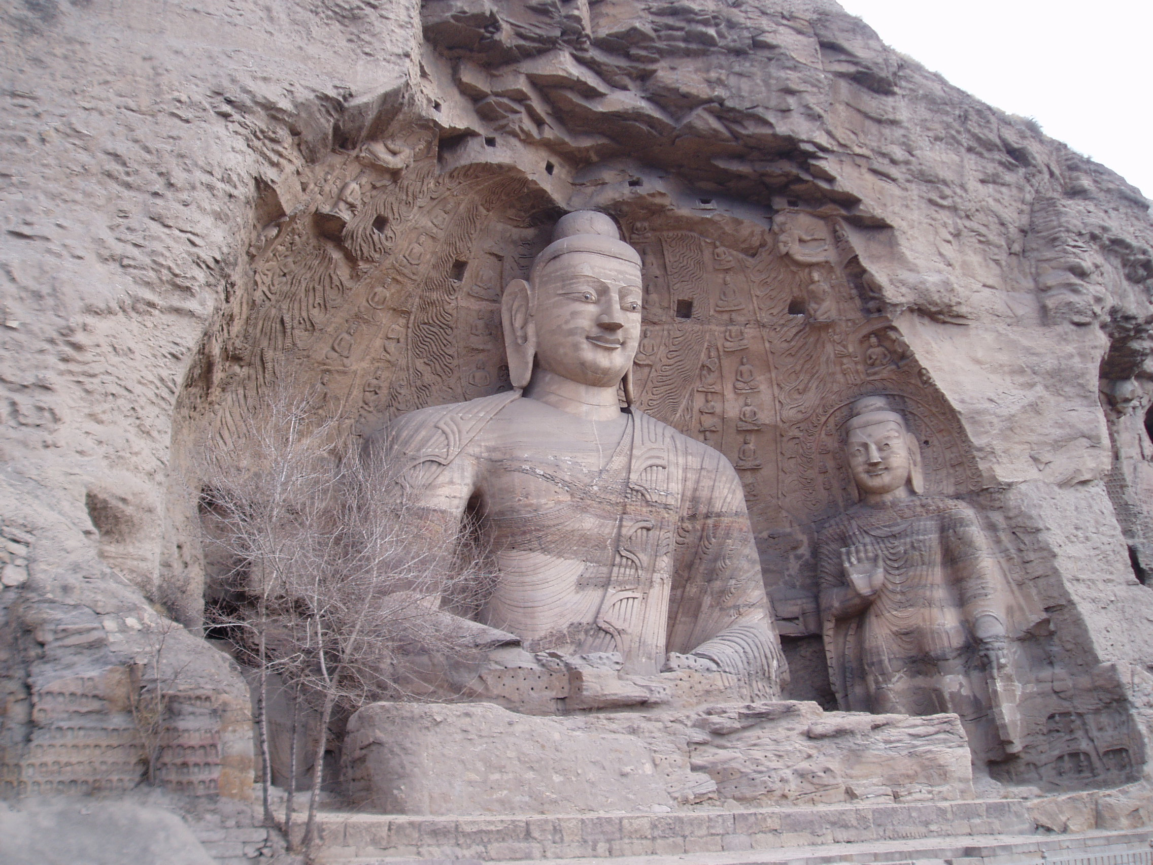 Buddha in Yungang Grottoes, Datong, Shanxi, China